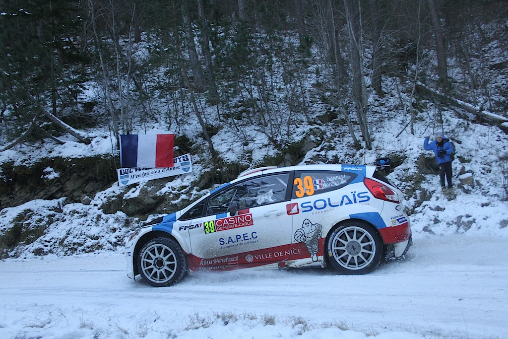 ES Thoard